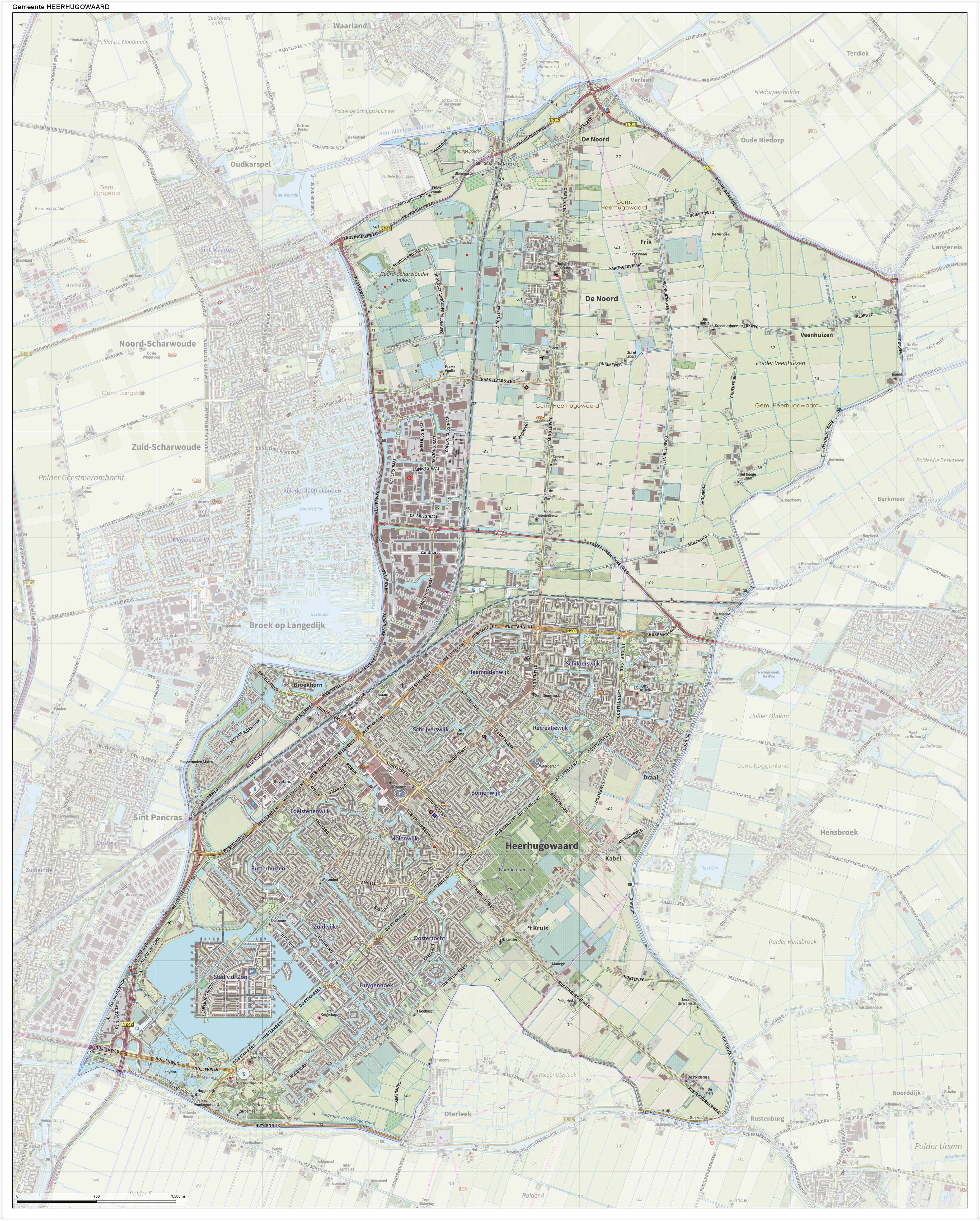 Topografische gemeentekaart. Resolutie: 400 pixels/km. Kaartbeeld samengesteld uit de open geodata van de Top10NL en Top25namen (Kadaster), Creative Commons-BY licentie. Gebouwvlakken uit open geodata BAG extract. Wegen uit de OpenStreetMap, OpenStreetMap community. Reliëfschaduw uit de Actuele Hoogtekaart AHN2. Samenstelling en kleurenschema: Jan-Willem van Aalst, met QGIS. Zie ook de Legenda.